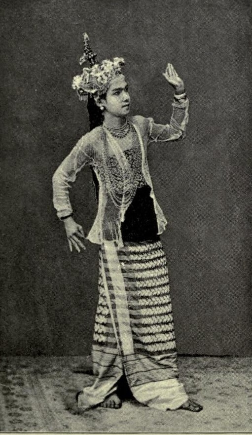 ビルマの女性